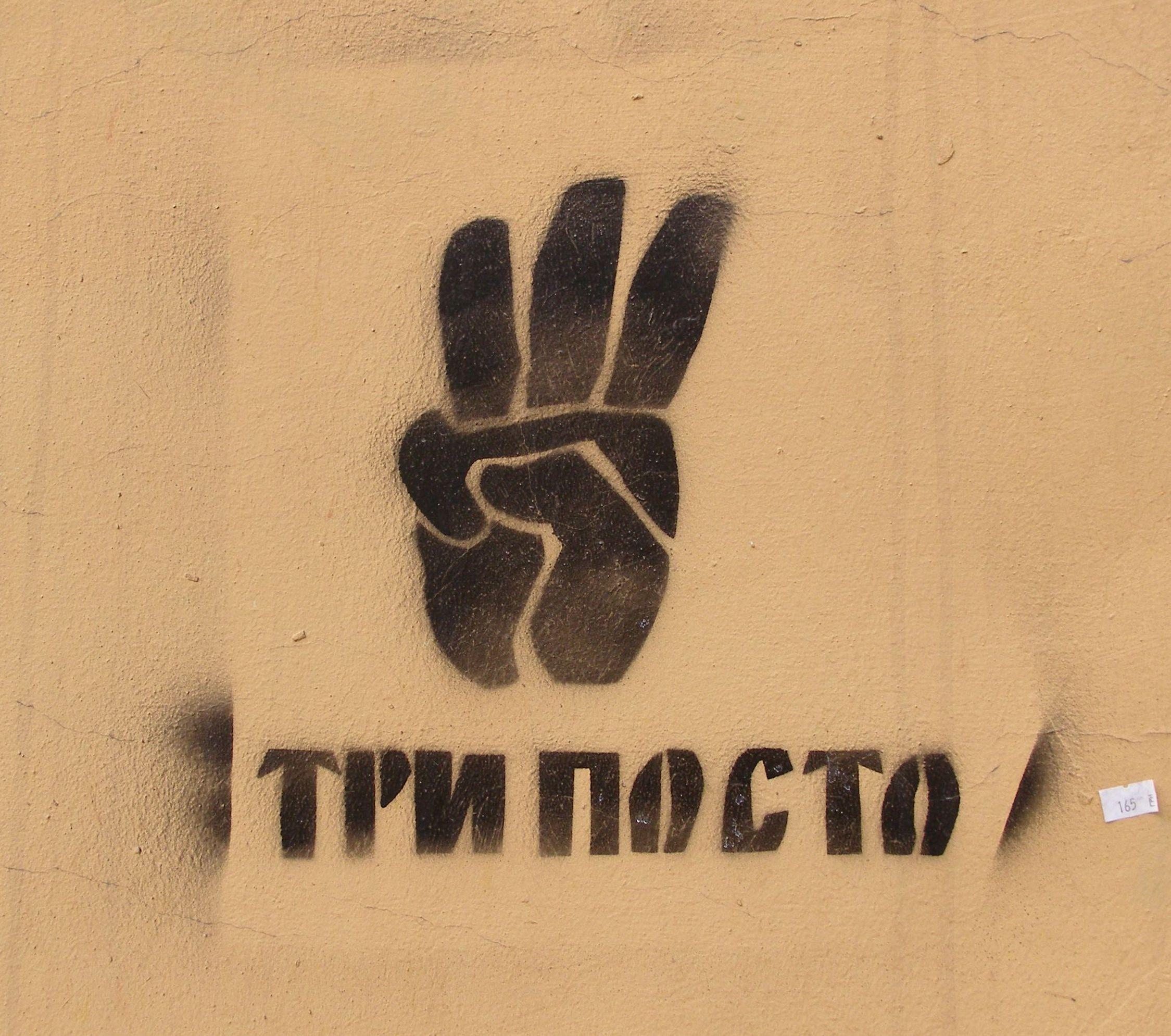 Eine Graffiti-Karikatur der Allukrainischen Vereinigung »Swoboda« in Lwiw